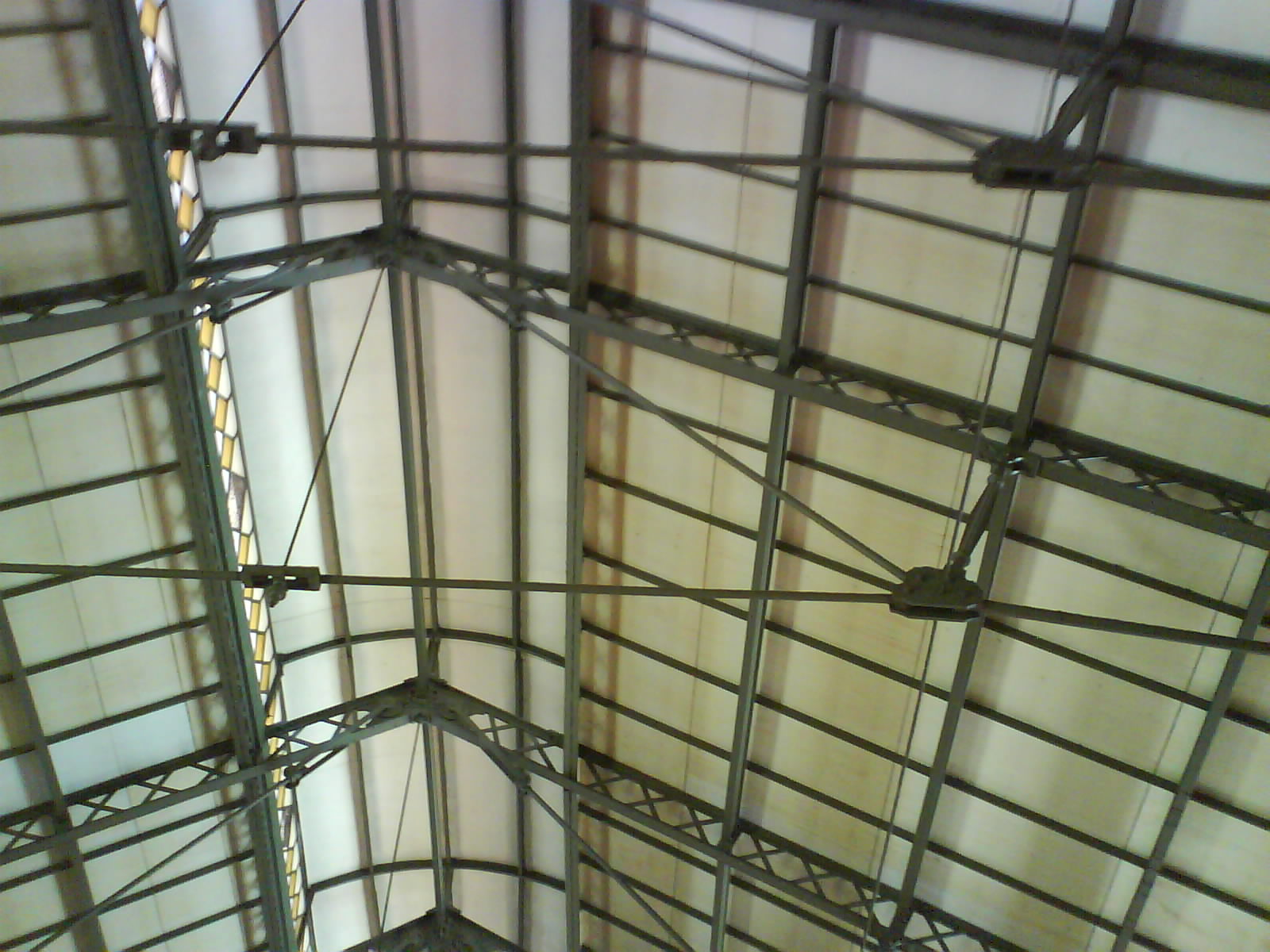 Interior de la cubierta del Mercado del Val (Valladolid), al descubierto la estructura metálica de tirantes y bielas de 1882.